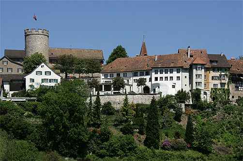 Regensberg